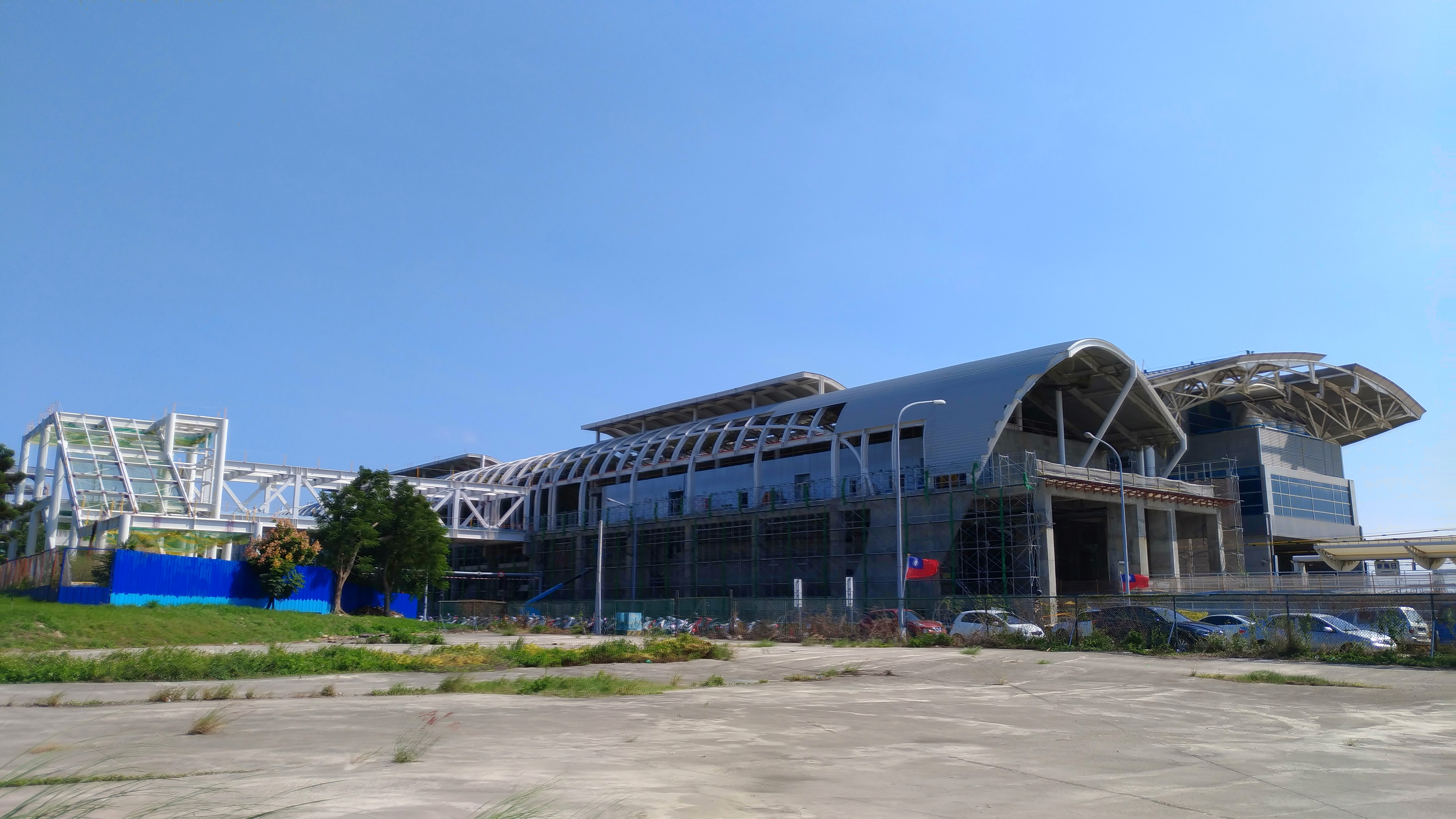 中文（台灣）: 台中捷運G17站2017年10月工程，右側後方為新烏日車站，左側為G16站出口路橋工程